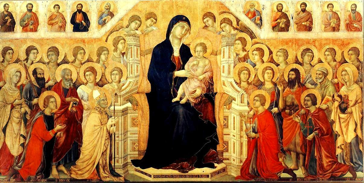 Altarretabel des Sieneser Doms, Vorderseite, Haupttafel, Szene: Thronende Maria mit Kind, Engeln, Heiligen und Apostelfiguren in Arkaden